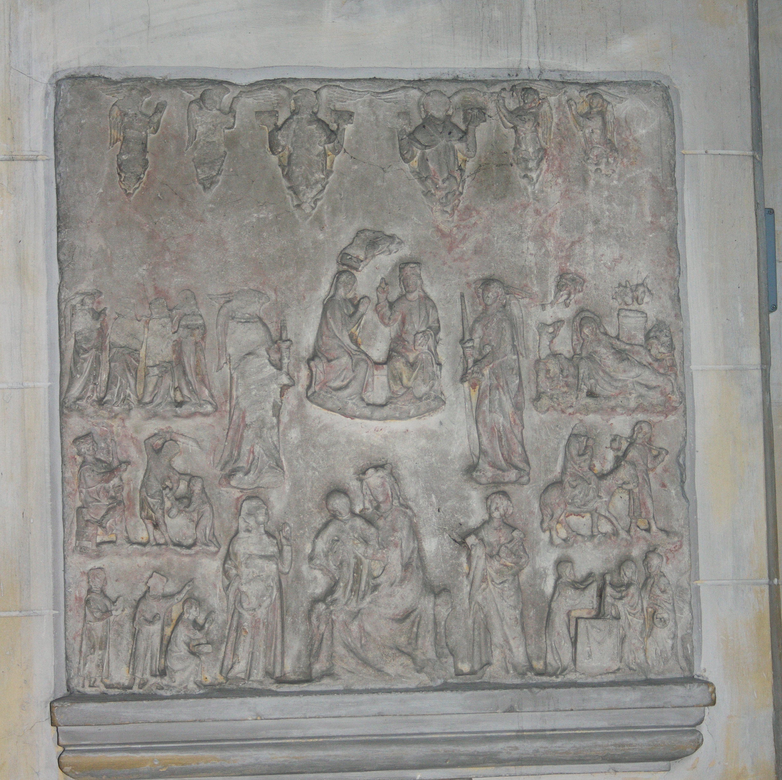 Kirche Saint-Georges in Villeneuve-Saint-Georges im Département Val-de-Marne (Île-de-France), Relief aus dem 16. Jahrhundert